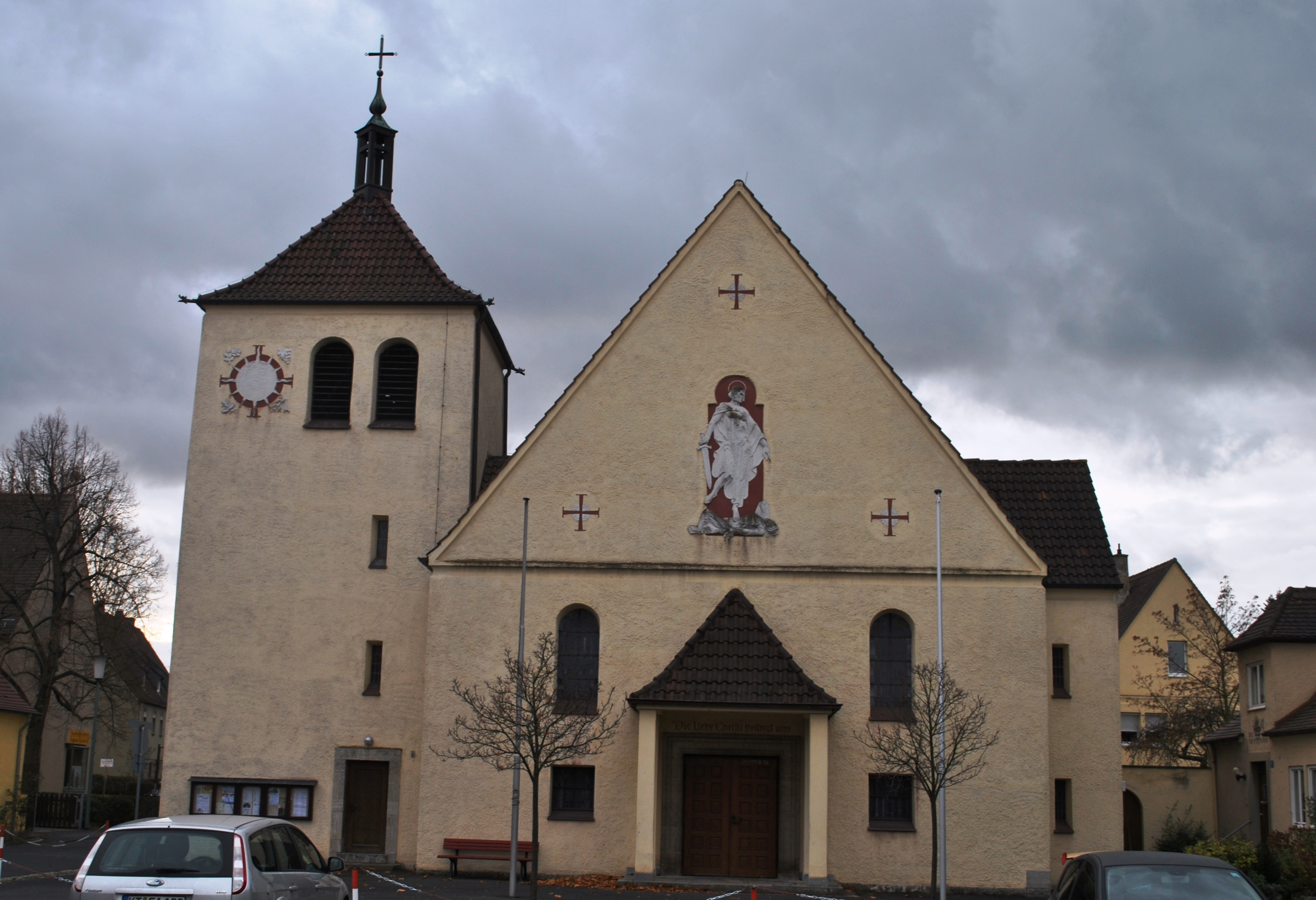 Katholische Pfarrkirche St. Vinzenz verputzter Satteldachbau, gedrungener Turm mit Laterne, im Innern Langhaus und Chor in Form von Parabeltonnen, verputzte Holzbinderkonstruktion, 1949/50 als Notkirche von Hans Schädel; mit Ausstattung